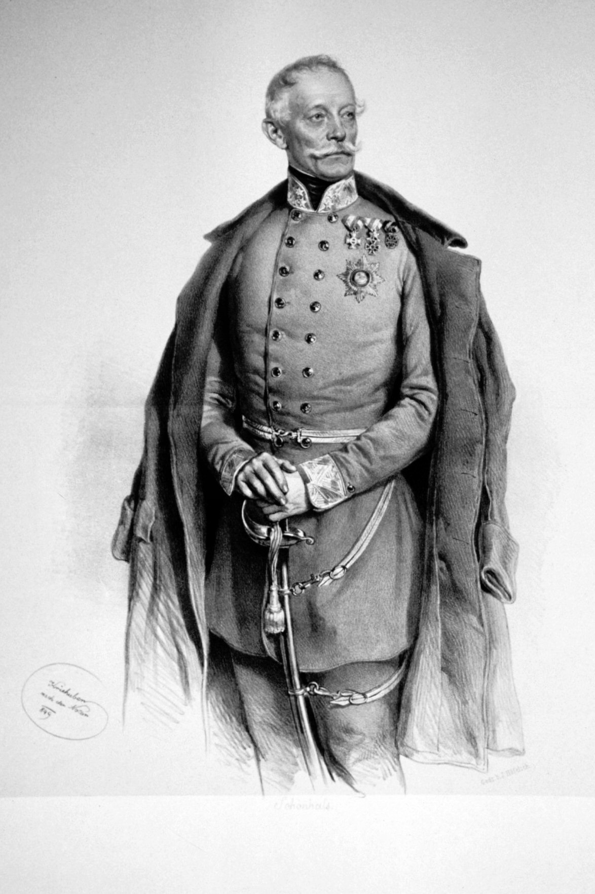 Karl Schönhals, Lithographie von Josef Kriehuber, 1849